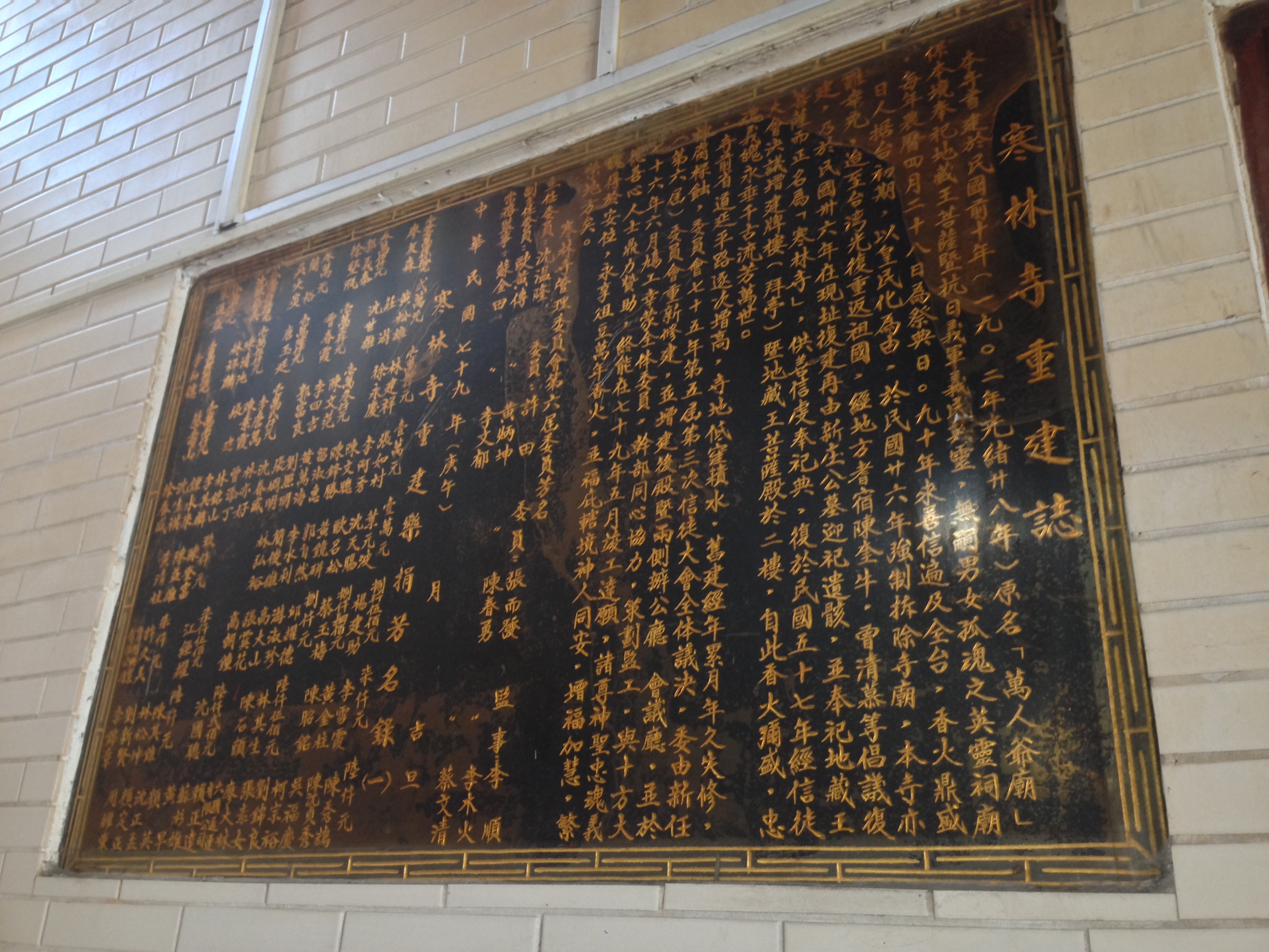 中文（台灣）: 寒林寺重建誌